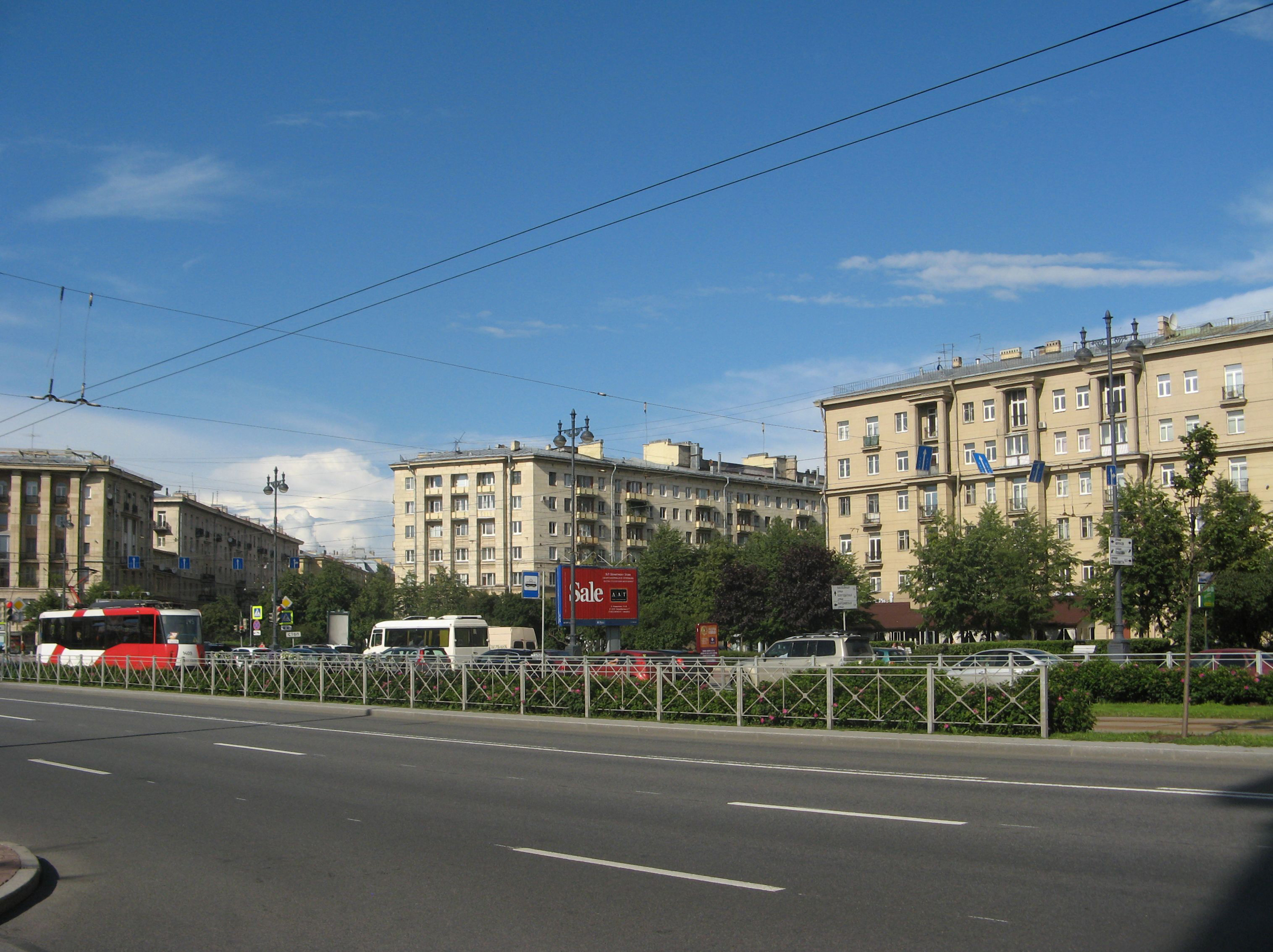 Площадь Братьев Стругацких в Санкт-Петербурге